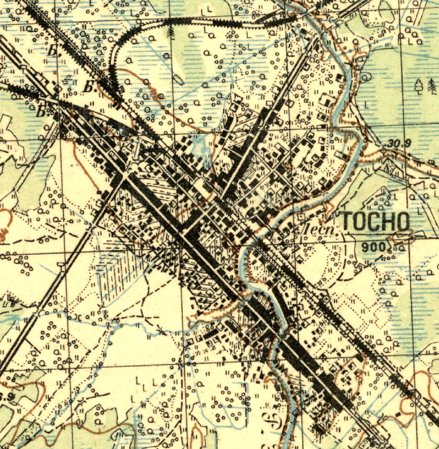 Топографическая карта Ленинградской области, квадрат О-36-14-Б (Тосно), село Тосно